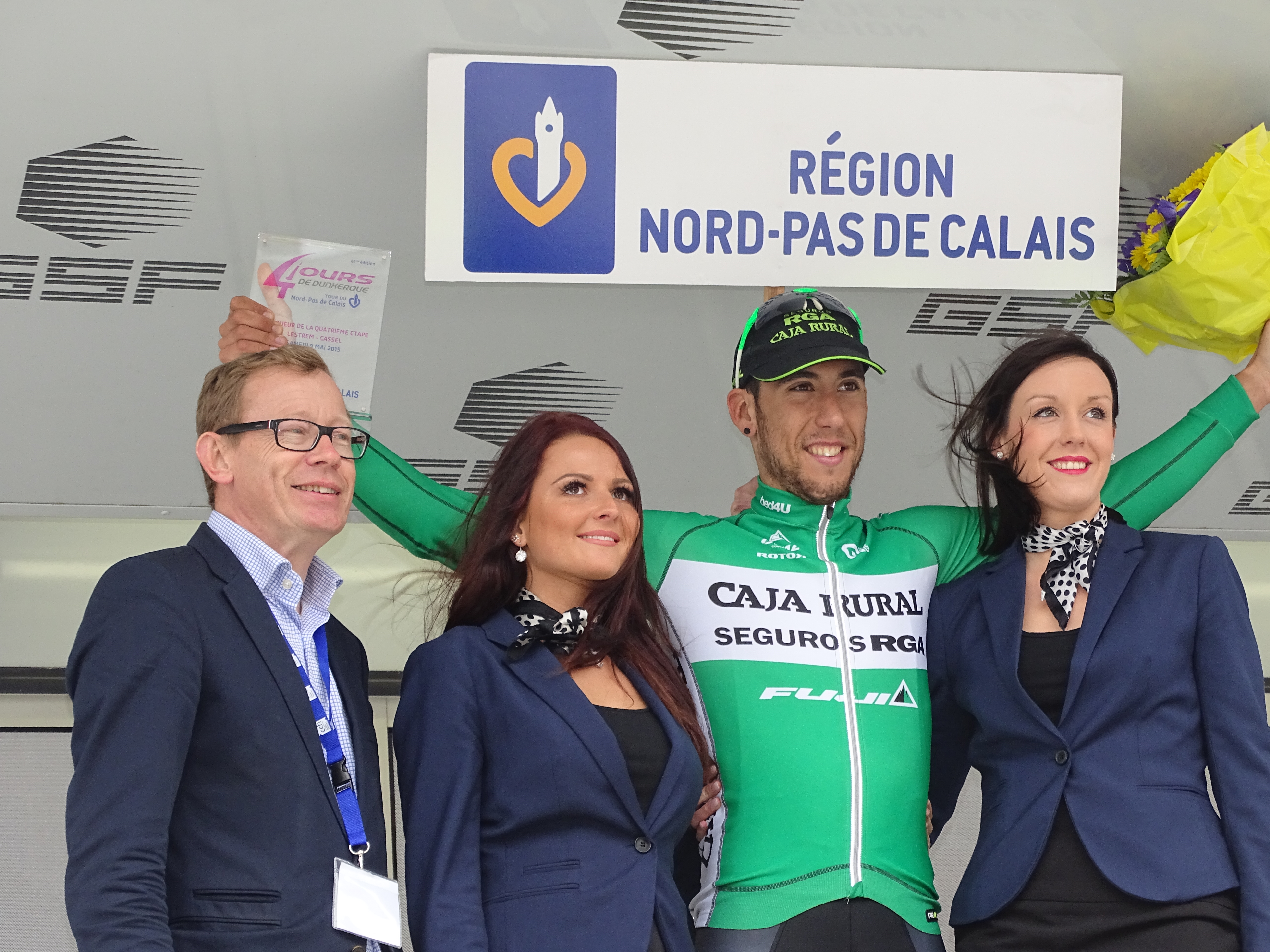 Reportage réalisé le samedi 9 mai 2015 à l'occasion de l'arrivée de la quatrième étape des Quatre jours de Dunkerque 2015 à Cassel, Nord, Nord-Pas-de-Calais, France.